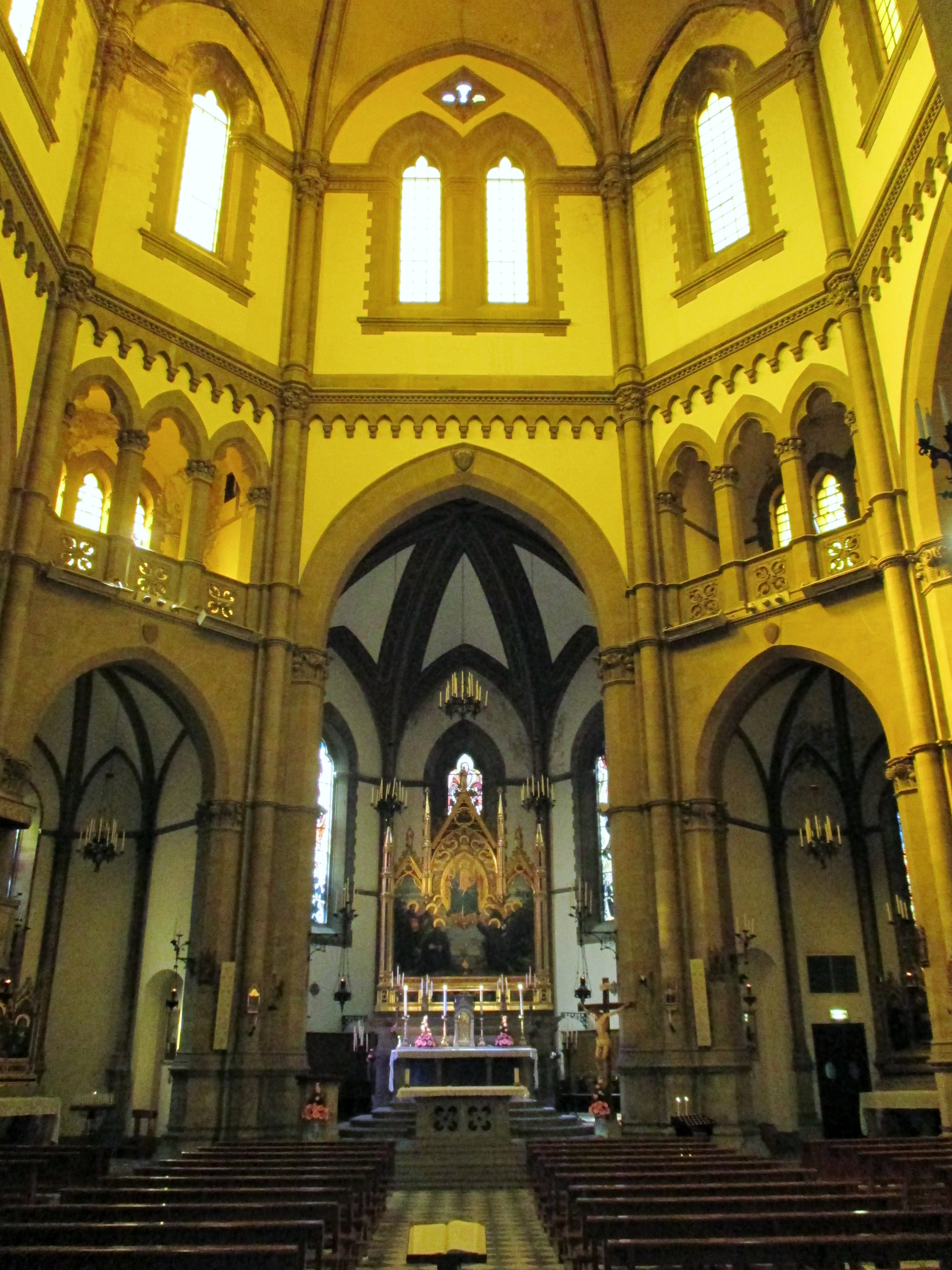 Firenze, chiesa dei Sette Santi Fondatori, interno e altare maggiore